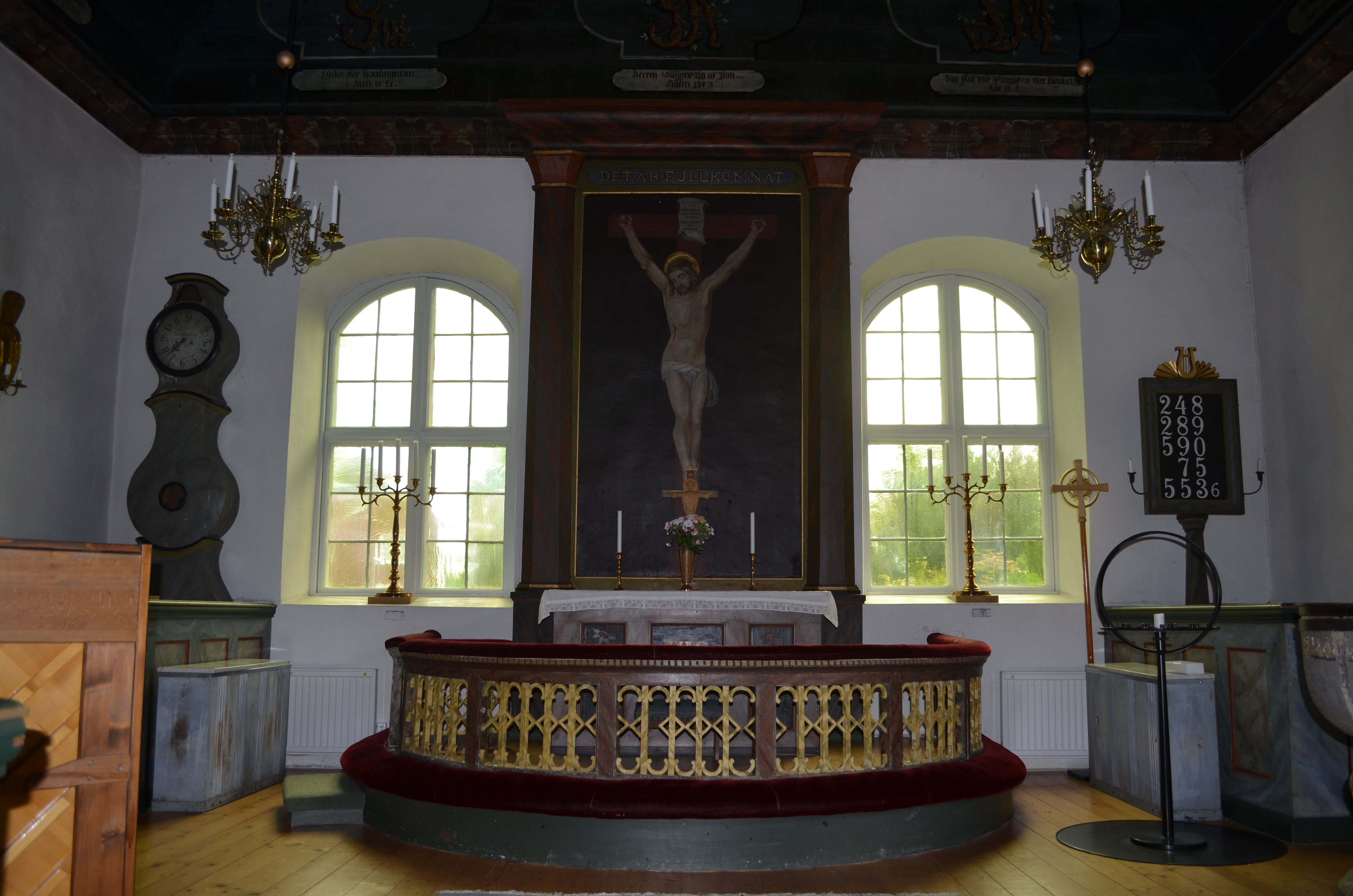 Altaret